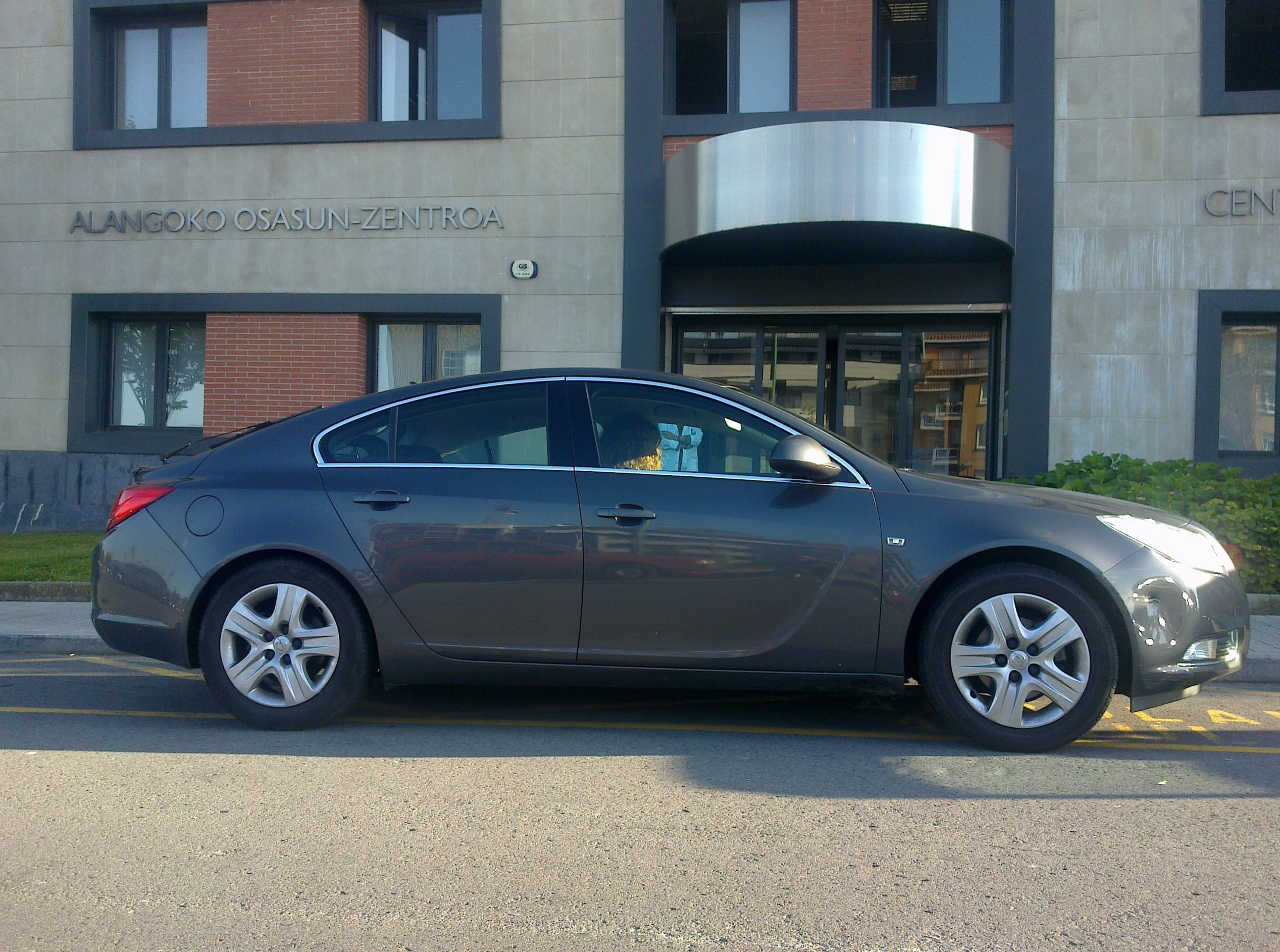 Opel Insignia Getxon